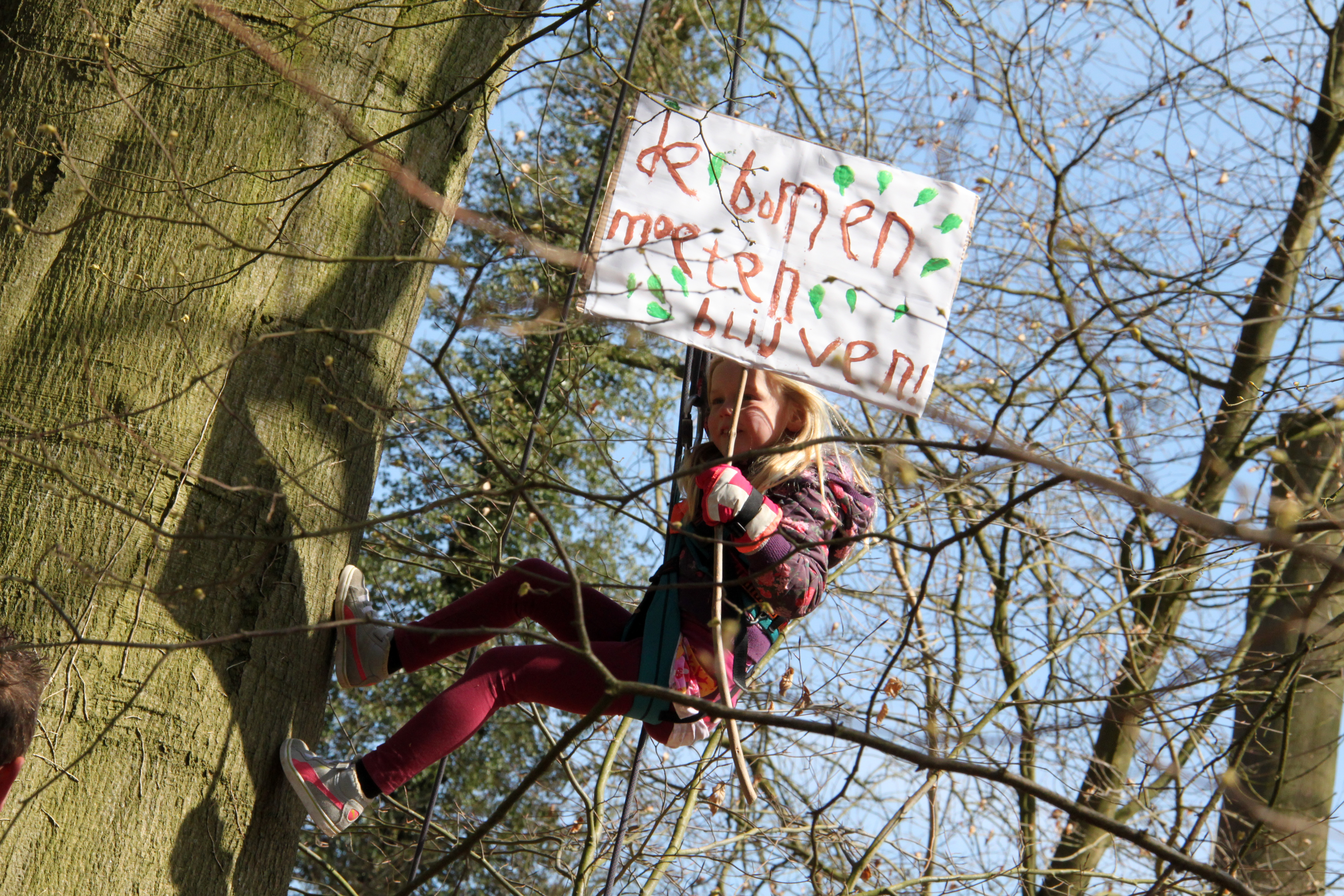 Een kind protesteert in de bomen van landgoed Amelisweerd tegen de verbreding van Rijksweg A27